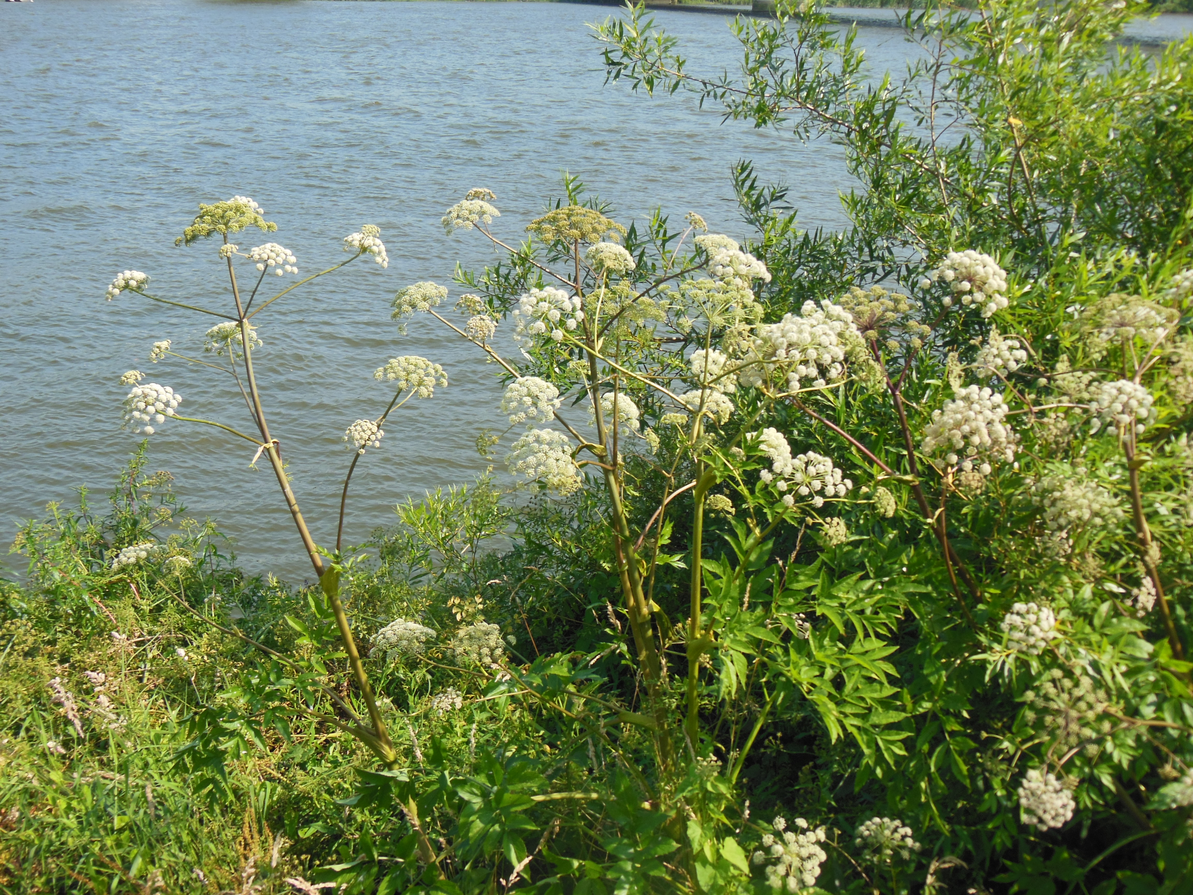 Angelica heterocarpa, ou Angélique des estuaires, en bordure de Loire à Nantes (France)